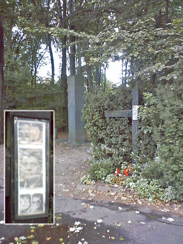 Gedenkkreuz und Mahnmal an die Opfer der Entführung von Hanns Martin Schleyer in Köln-Braunsfeld